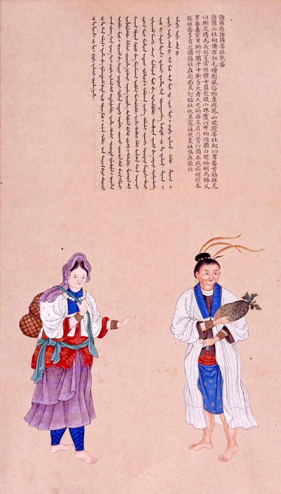 中文（香港）: 清 謝遂 職貢圖